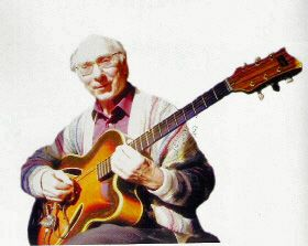 Thomas Buhe